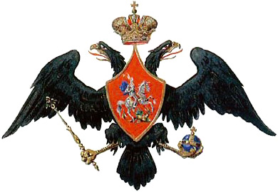 Российская империя 1825–1855 гг. Первый тип государственного герба при Николае I. Бумага, акварель. Государственный Эрмитаж. С.-Петербург